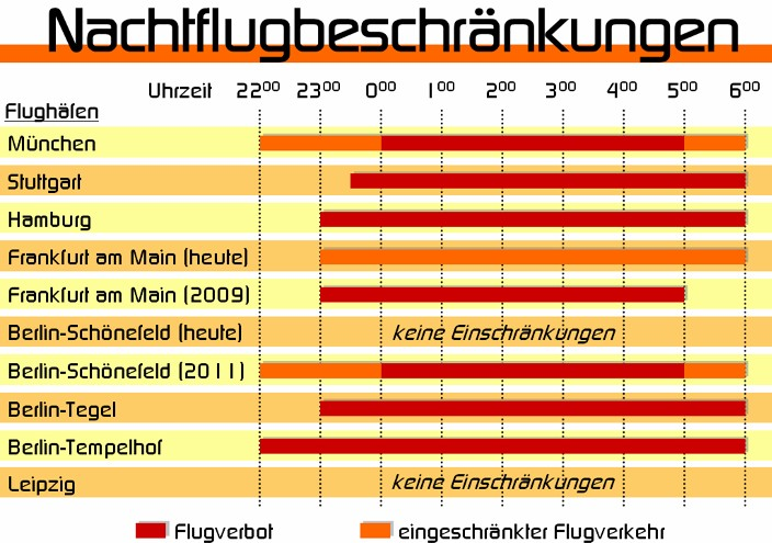 Nachtflugbeschränkungen und Flugverbot an deutschen Flughäfen Schema wurde selbst erstellt